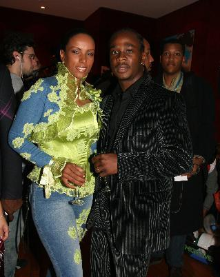 admiral t